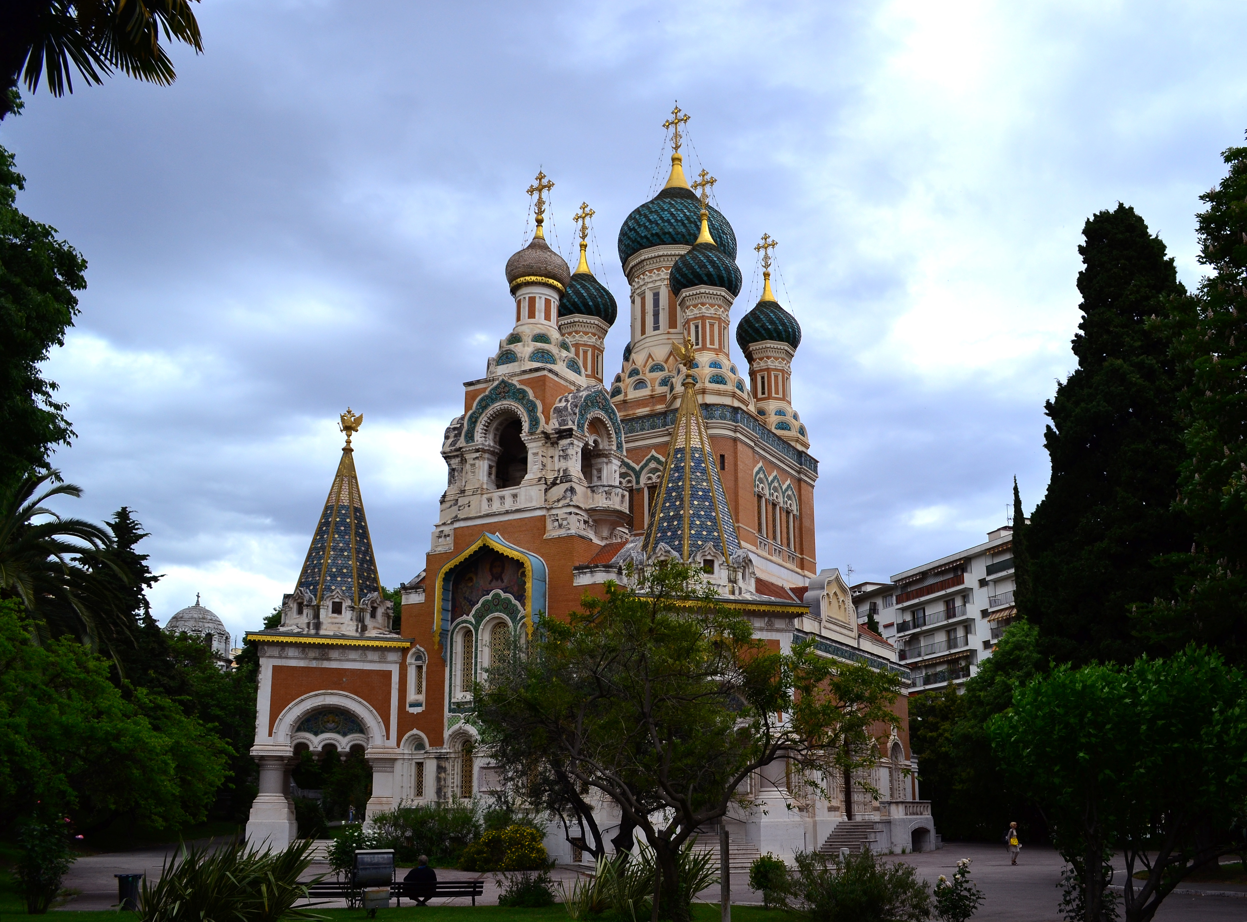 Cathédrale Saint-Nicolas de Nice